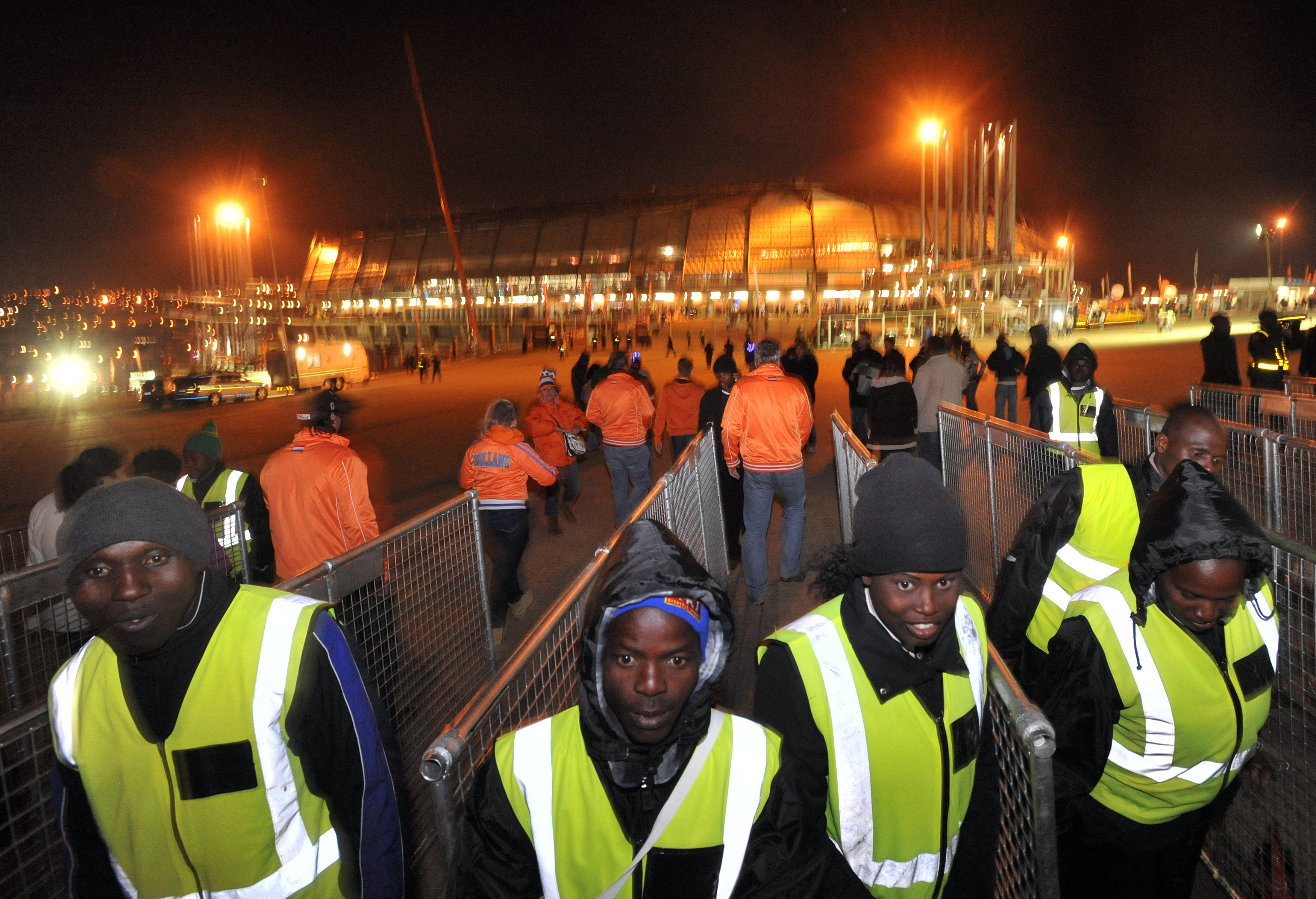 Joanesburgo (África do Sul) - Empresas de segurança privada sul-africanas aumentam contratações e o faturamento na Copa do Mundo.